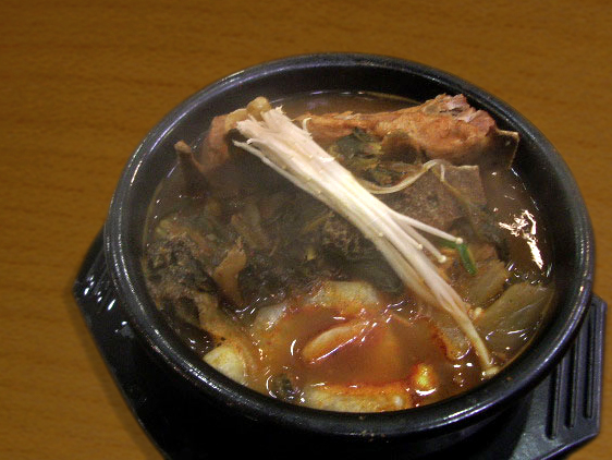 해장국